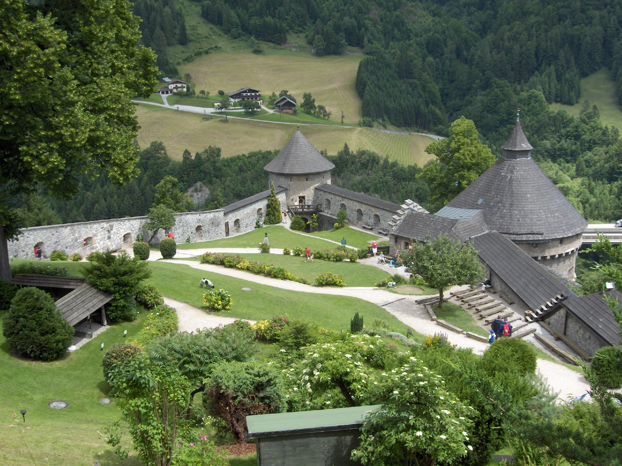 Hohenwerfen have. Taget 2004